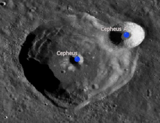 Cráter Cepheus LROC (Cráteres satélite)